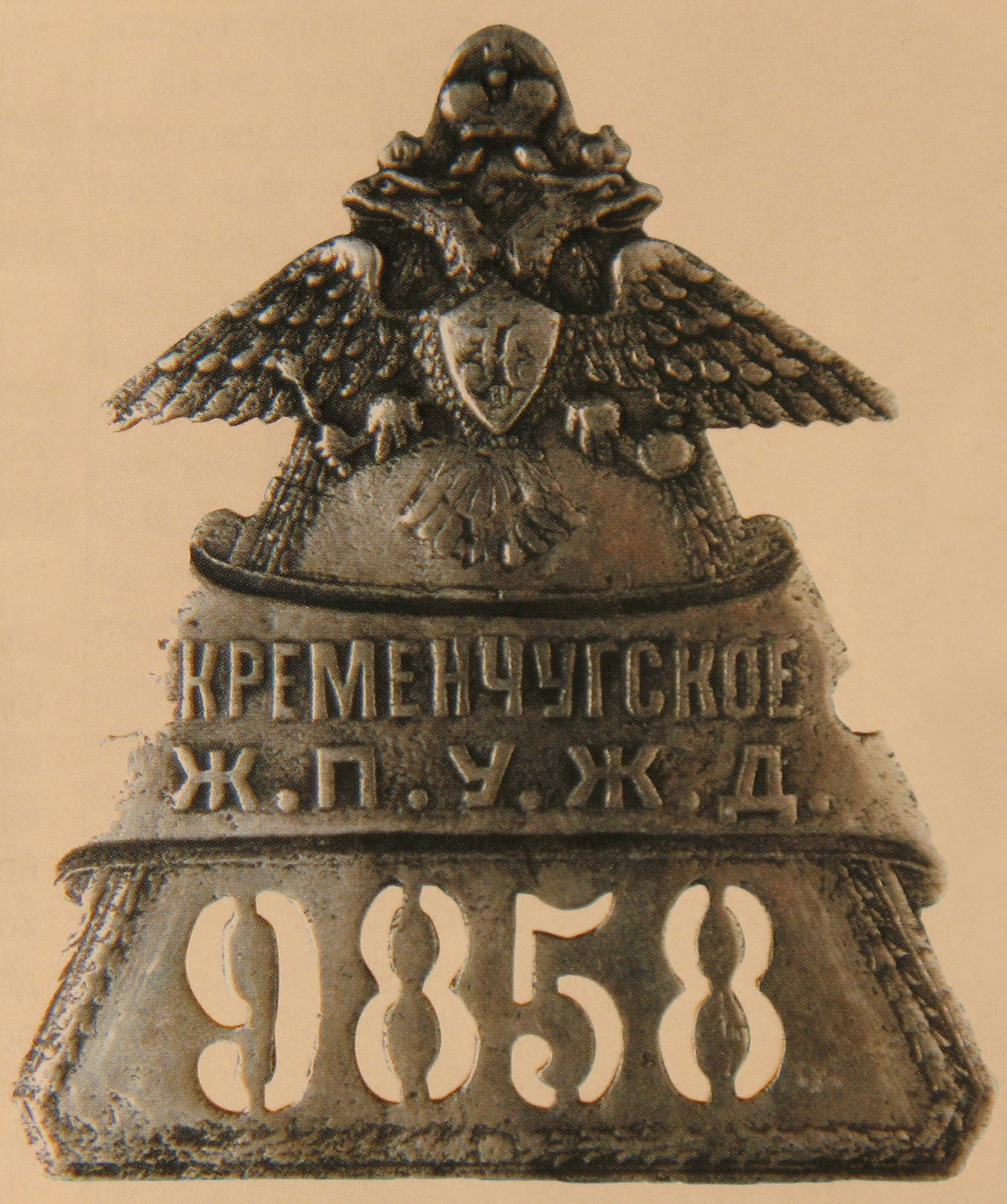 Металлическая бляха железнодорожного жандарма # 9858 Кременчугского ж.андармского п.олицейского у.правления [Южных] ж.елезных д.орог (Полтавская губерния) с вензелем Николая Второго на малом гербе России.